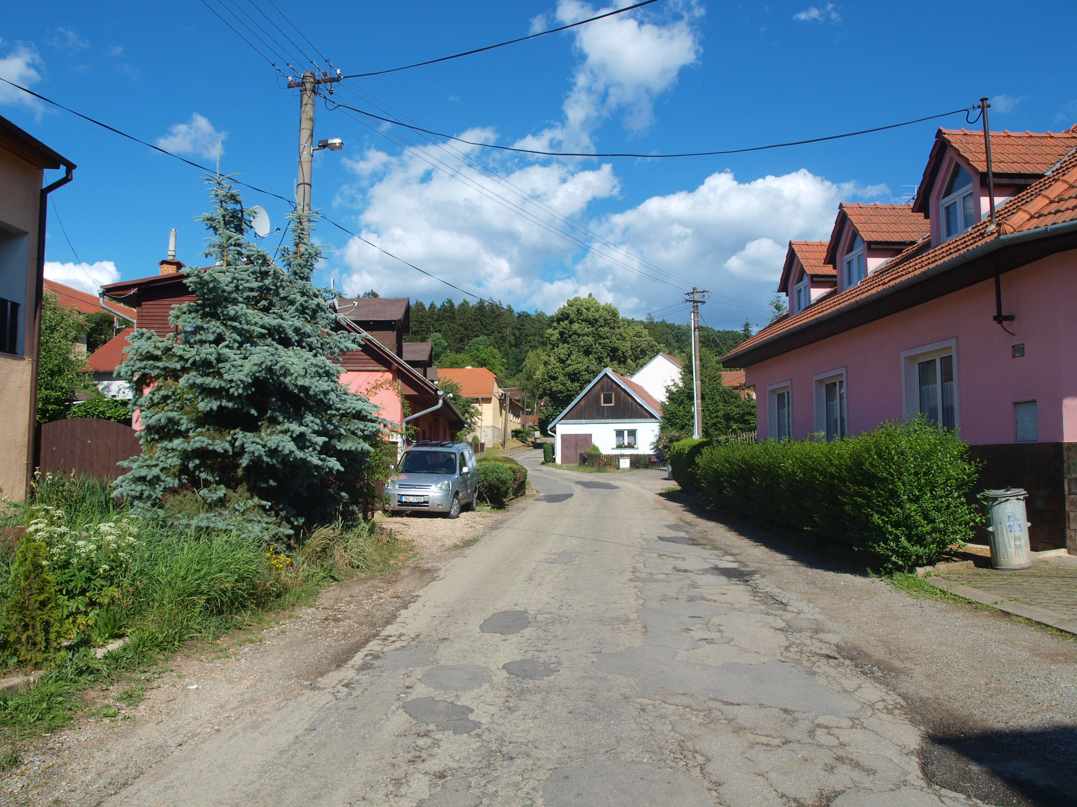 Náves v obci Malá Lhota v okrese Blansko